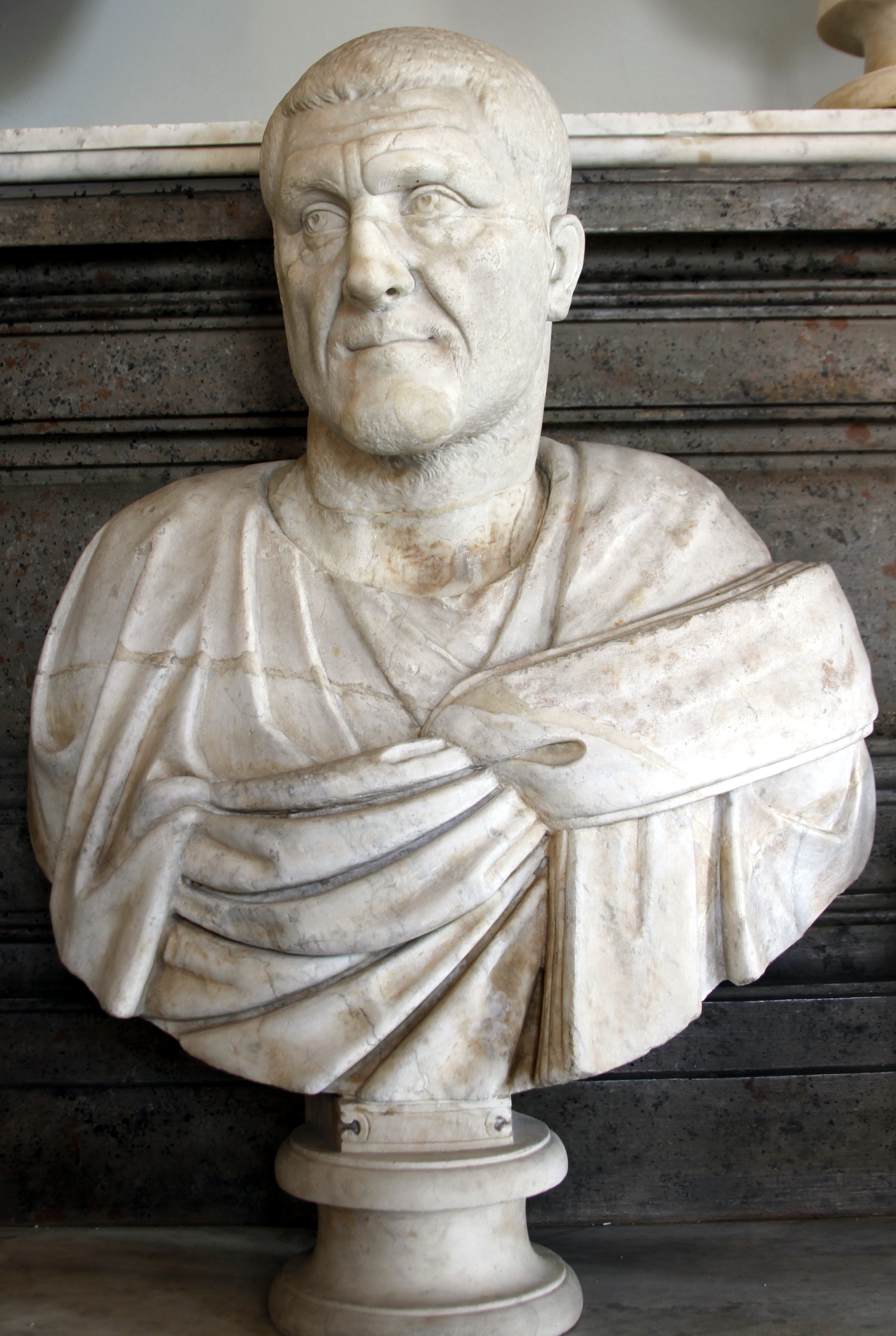 Palazzo Nuovo - Musei Capitolini - Rome